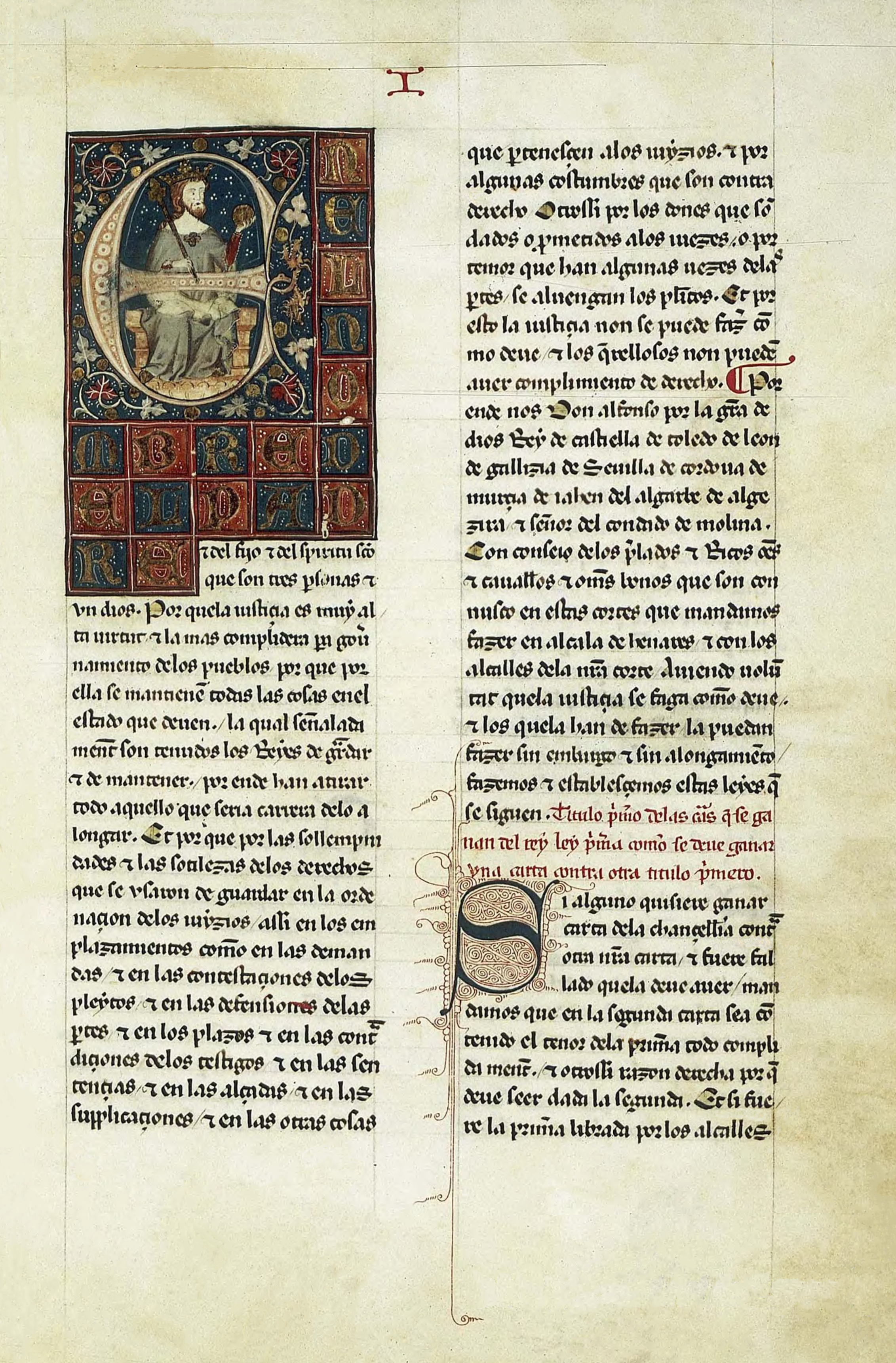 Primera página del Ordenamiento de Alcalá promulgado por Alfonso XI de Castilla en 1348. Publicado en 41 hojas de pergamino de 325 x 255 x 20 mm. Consta de 131 leyes, estructuradas en 32 títulos, que recogen varias textos legislativos cada uno. Sirvió para homogeneizar y sistematizar algunas disposiciones jurídicas medievales, y establecer la primacía en el orden de prelación del derecho real sobre cualquier otra norma de carácter territorial o local.[1]